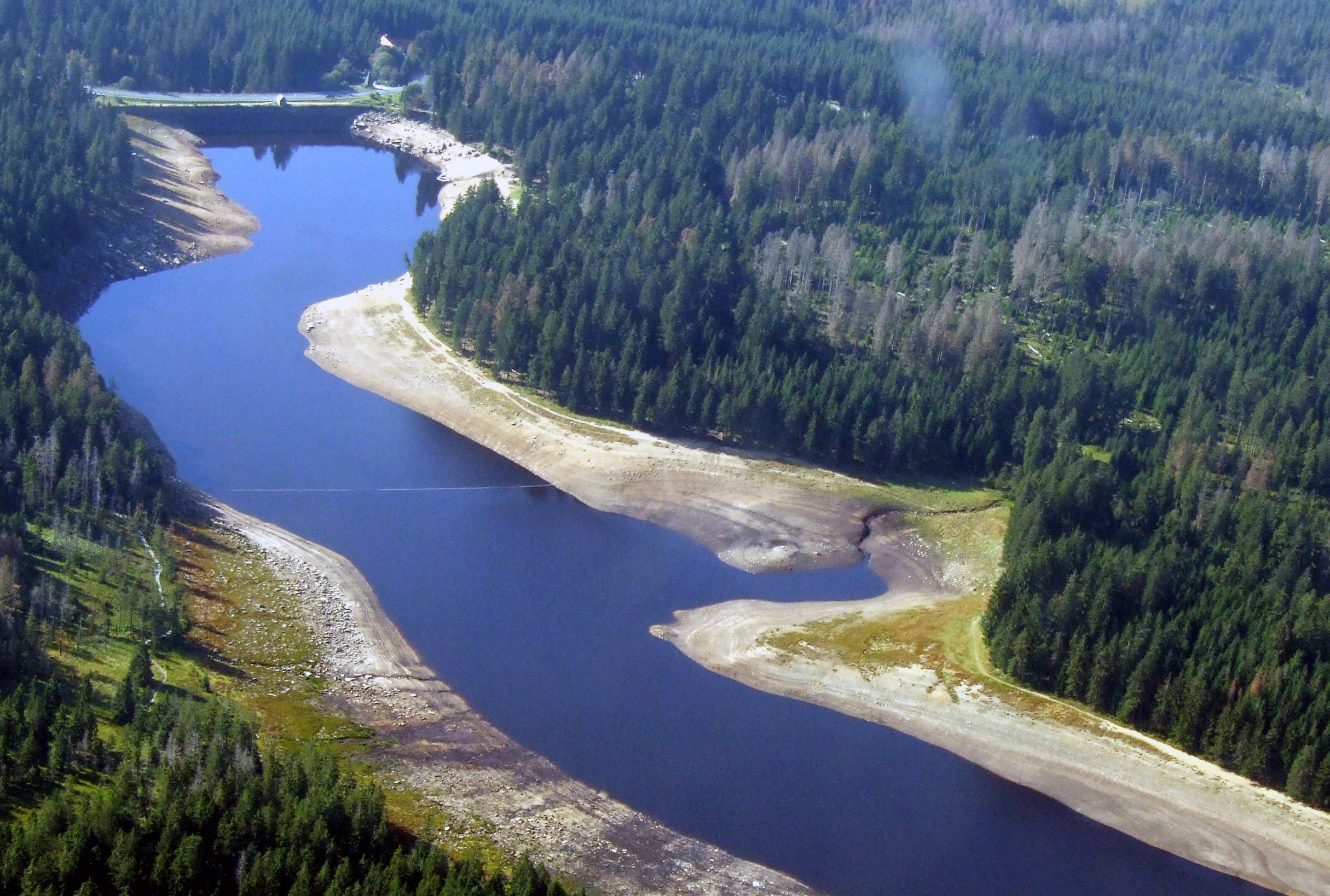 Oderteich: Luftbild von Wasserfläche und Damm aus Richtung Nordost